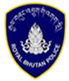 Insígnia da Real Polícia do Butão.